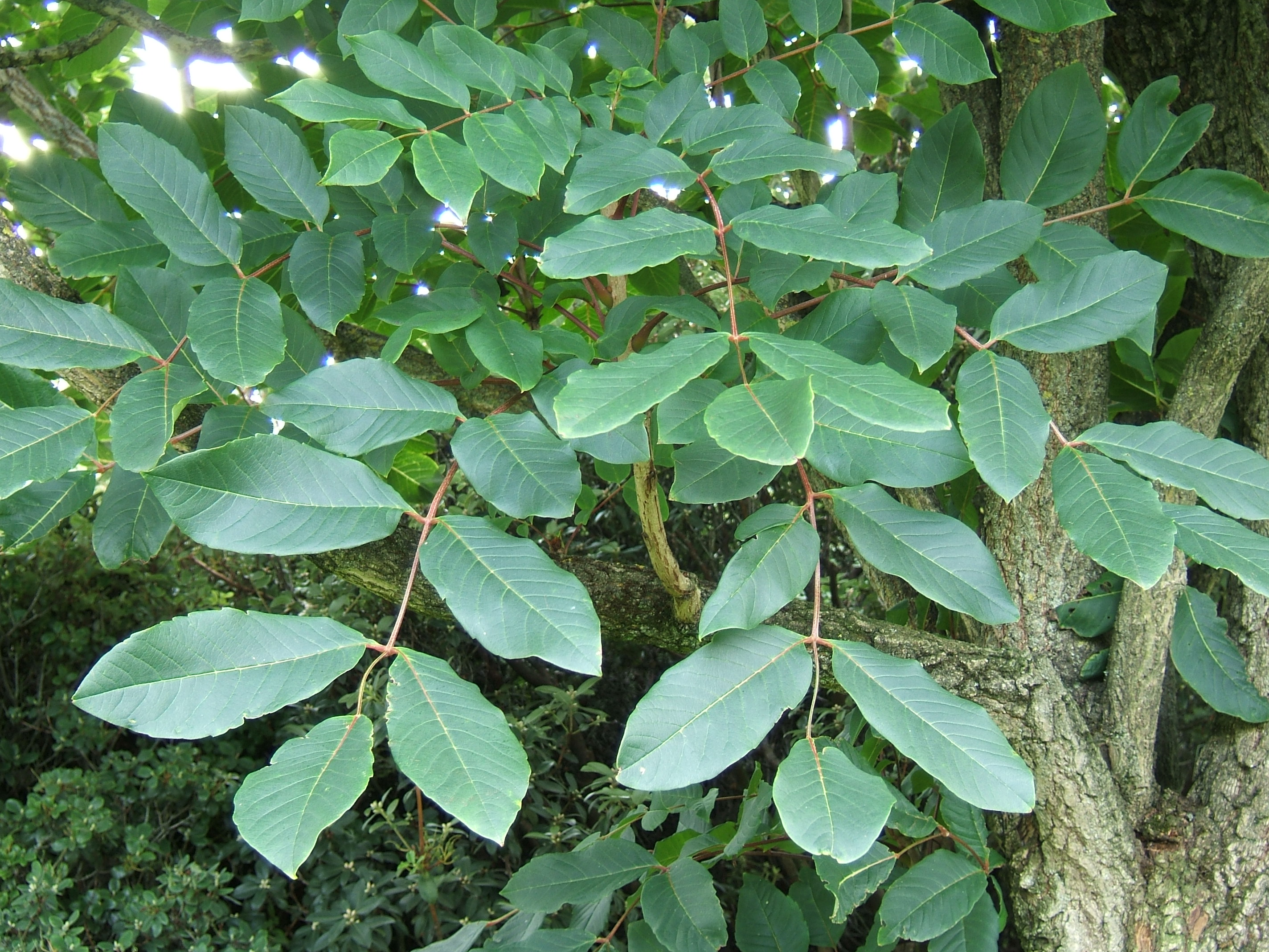 Meliosma veitchiorum (Sabiaceae), cultivated UK